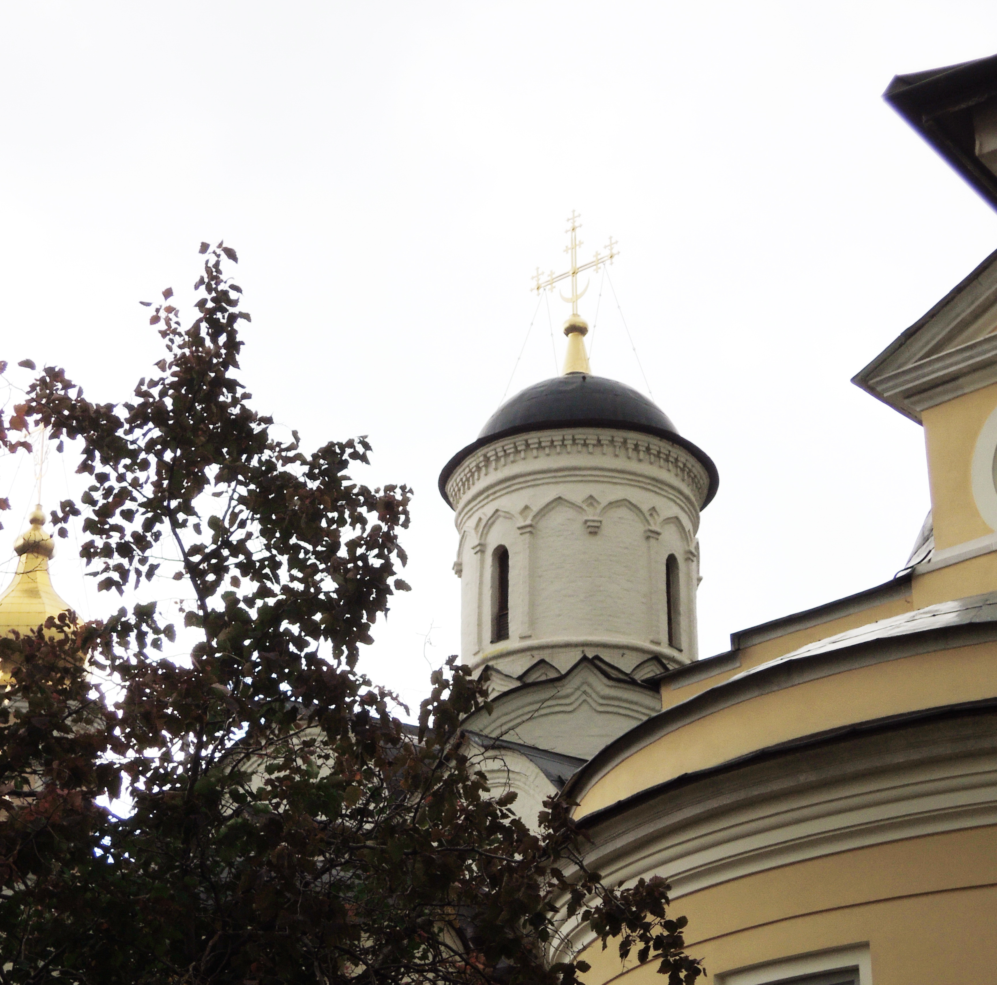 Церковь Антипия на Колымажном дворе